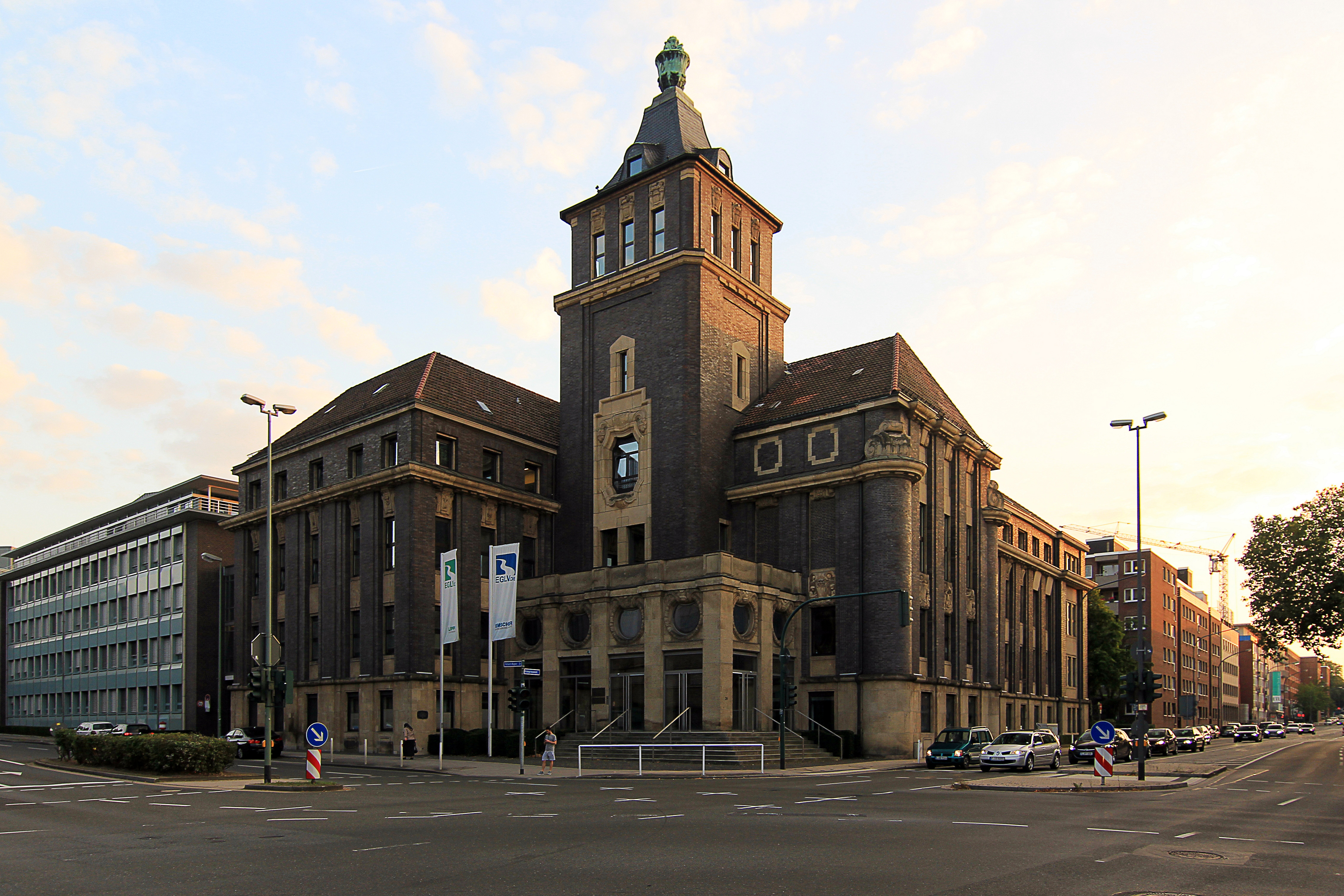 Verwaltungsgebäude der Emschergenossenschaft, Kronprinzenstraße 24, Essen-Südviertel This is a photograph of an architectural monument.